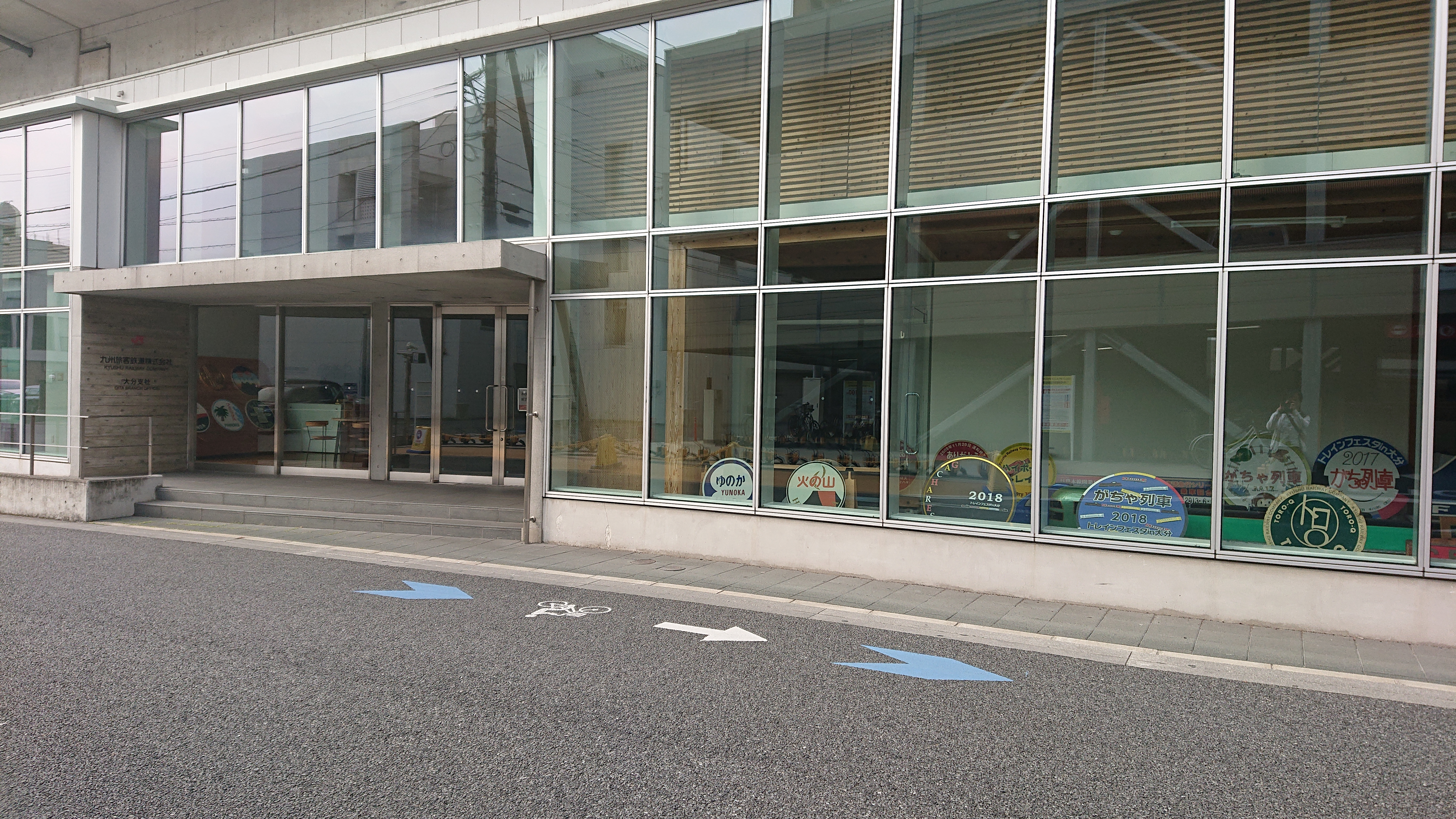 九州旅客鉄道大分支社を正面から眺める。窓際には寝台特急等のヘッドマークが展示されている。